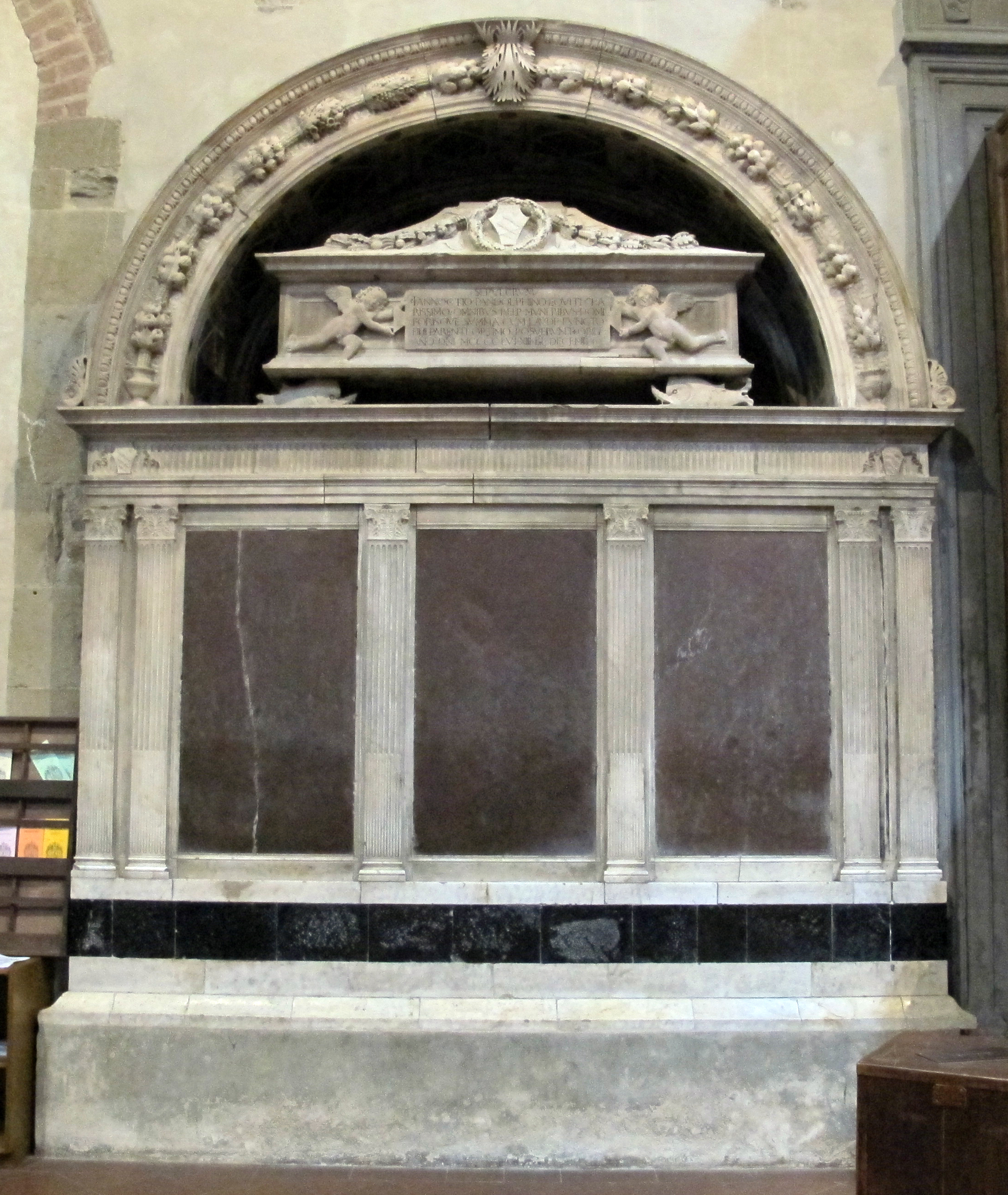 Bernardo rossellino (bottega), monumento a giannozzo pandolfini